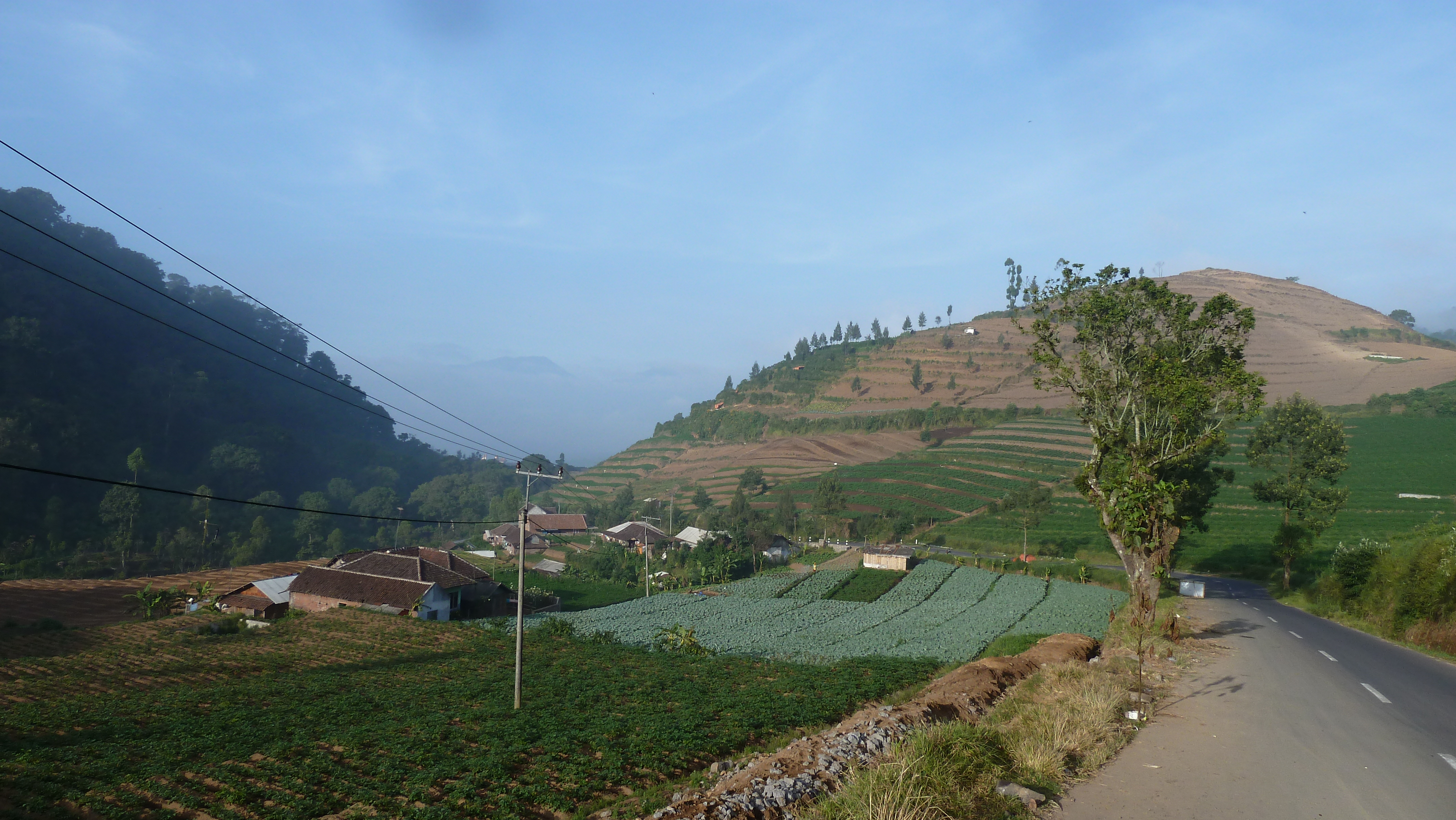 Cangar, Batu